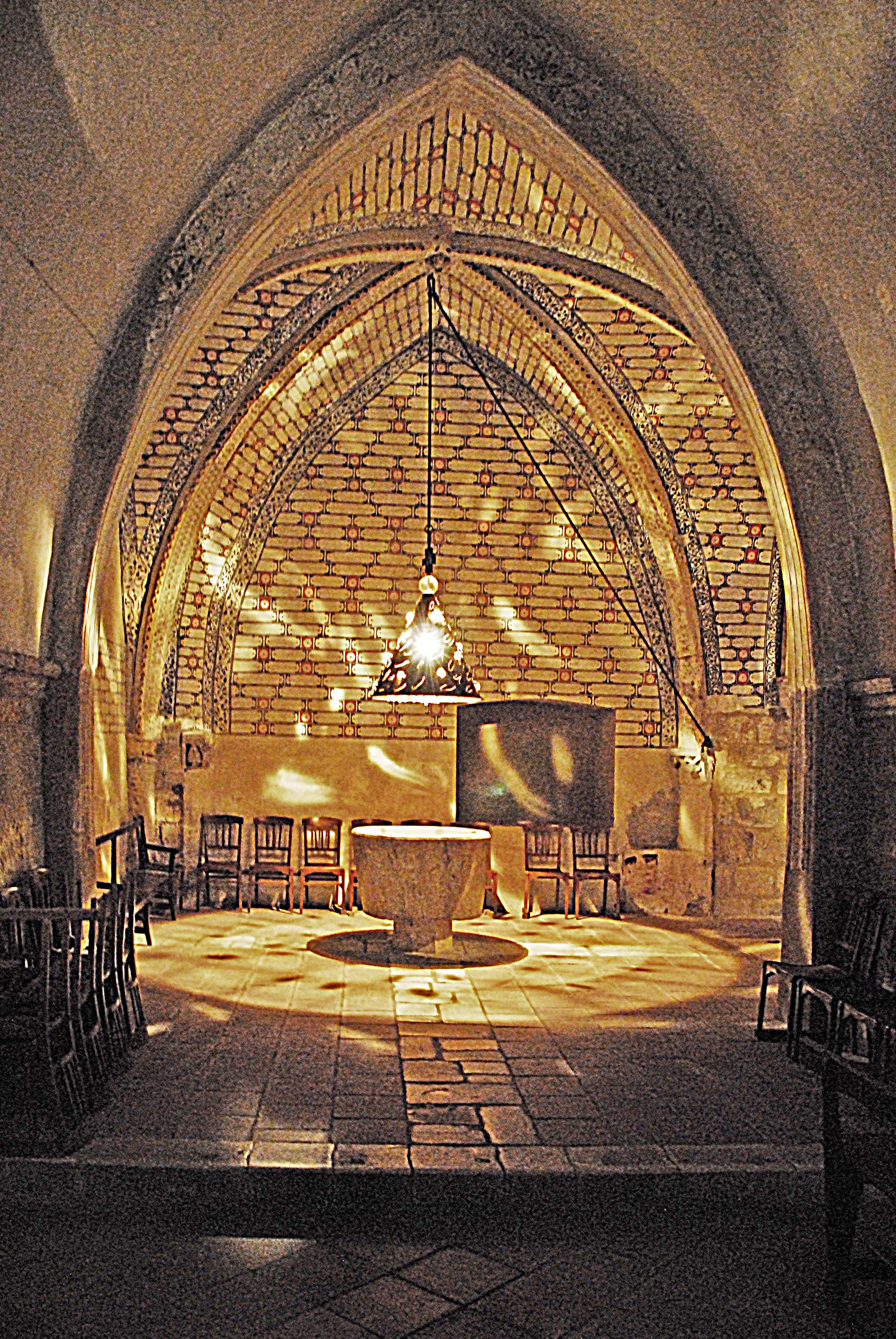 Ste-Eulalie-et-Ste-Julie_d’Elne, Taufkapelle in Narthex